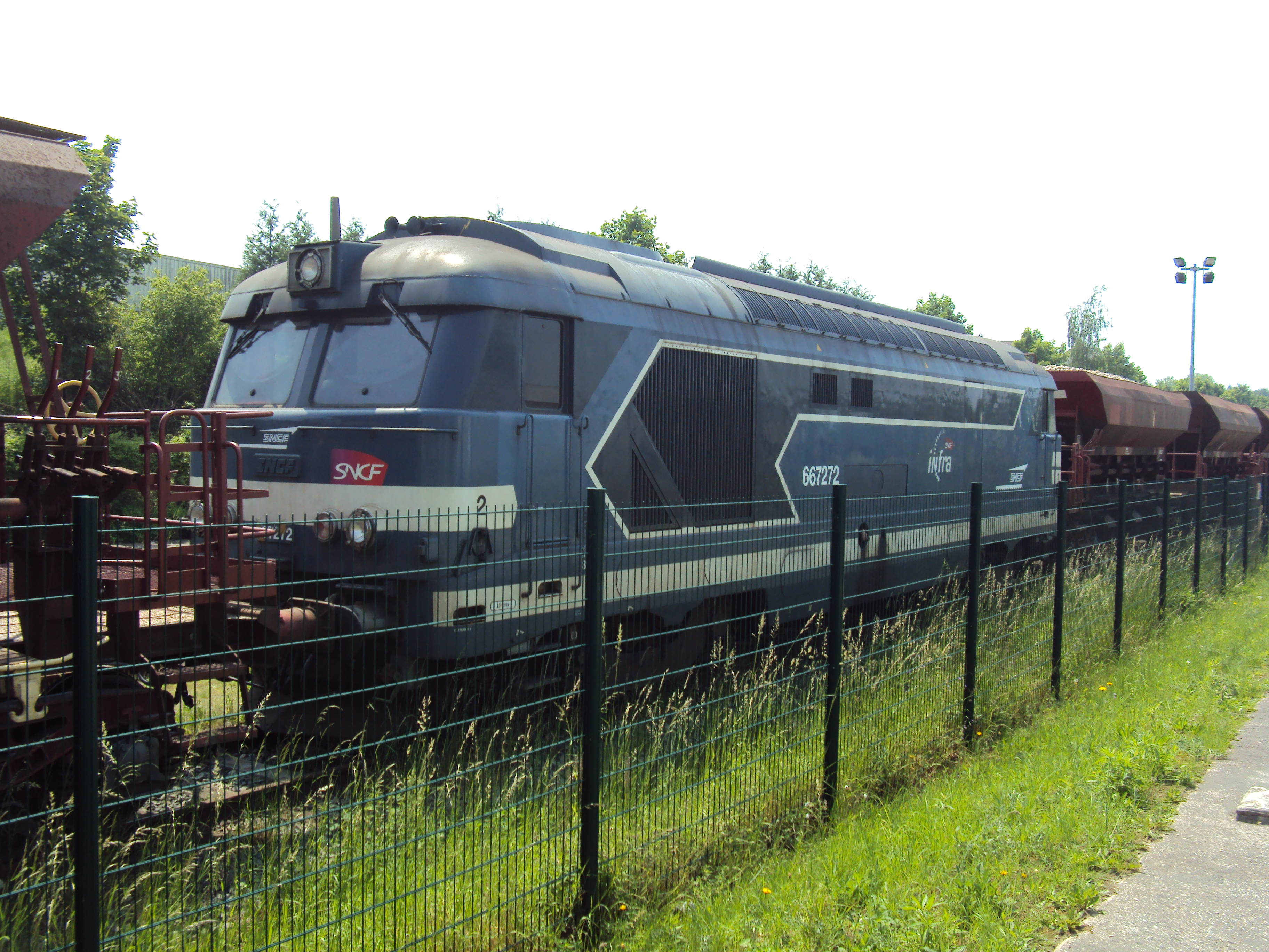 BB67272 et sa rame de Ballast stationnee a Lizy sur ourcq